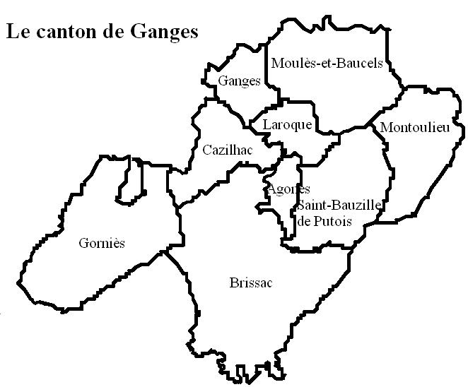 Le canton de Ganges Image personnelles